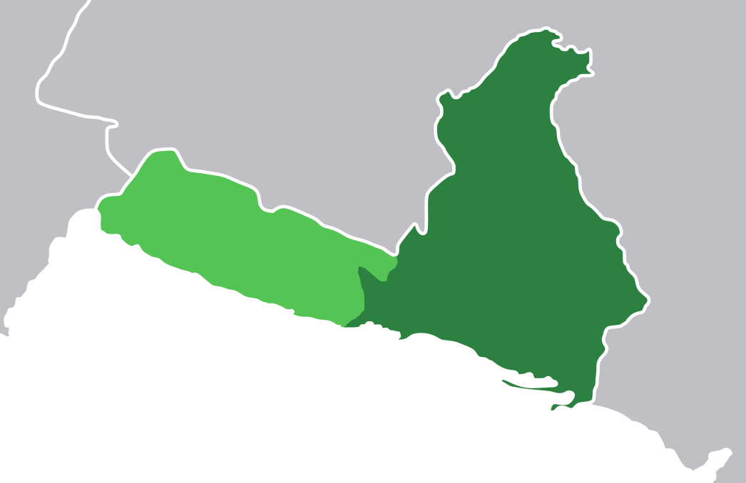 Mapa alemán de Fiune